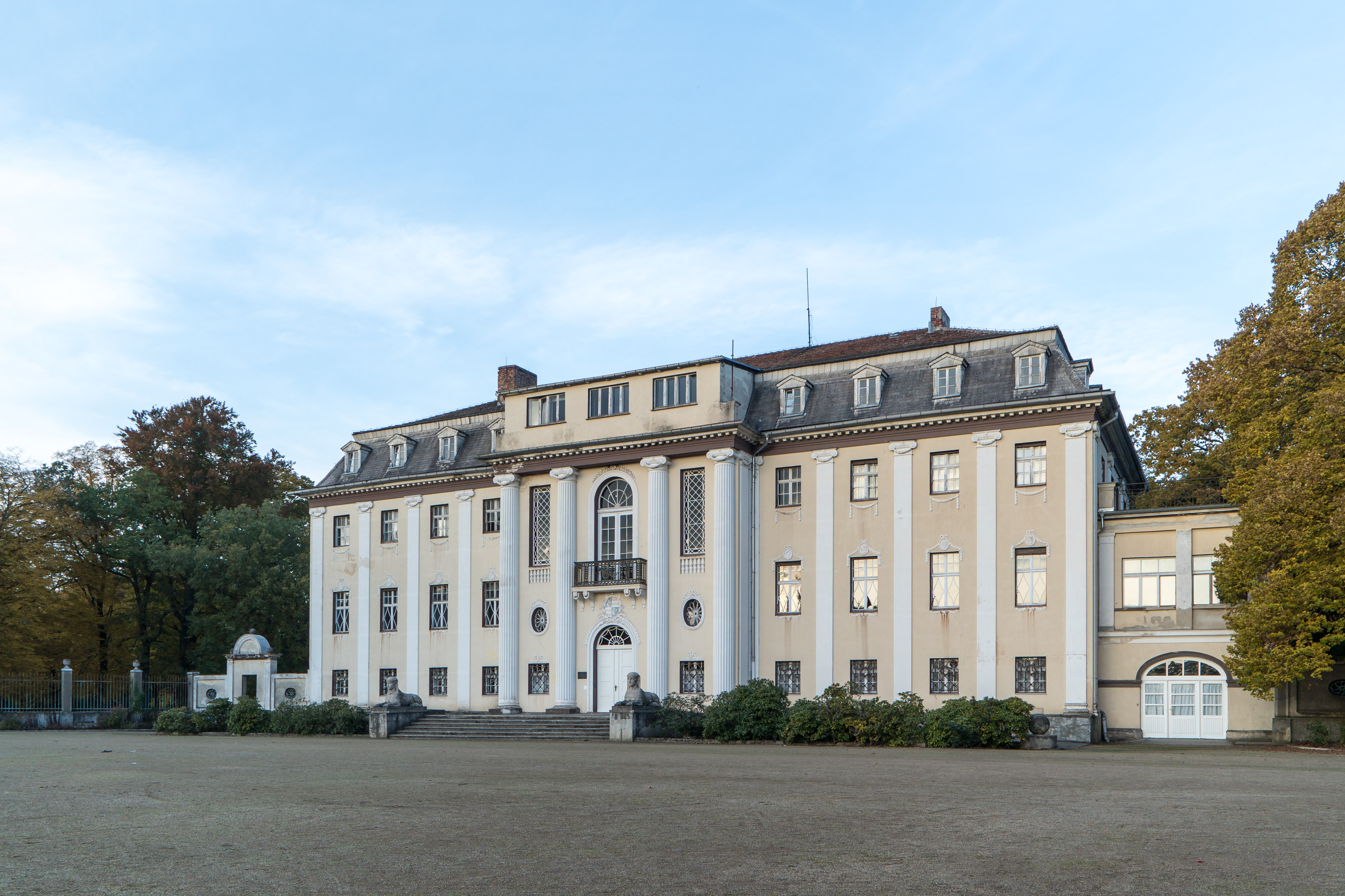 Neues Schloss im Stadtpark von Tangerhütte